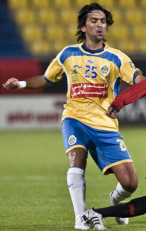 Nashat Akram